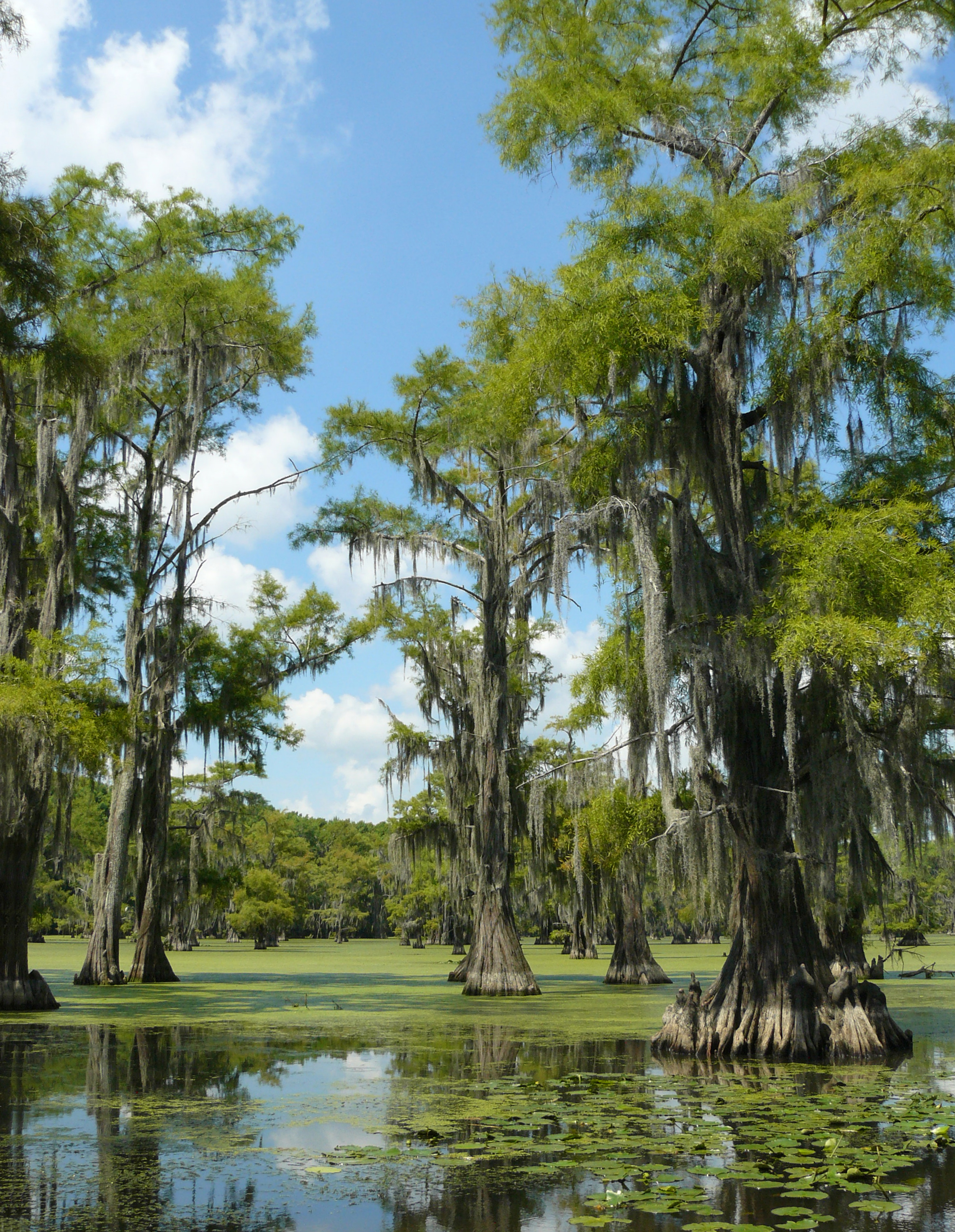 Taxodium distichum forest, Caddo Lake, Texas, USA.